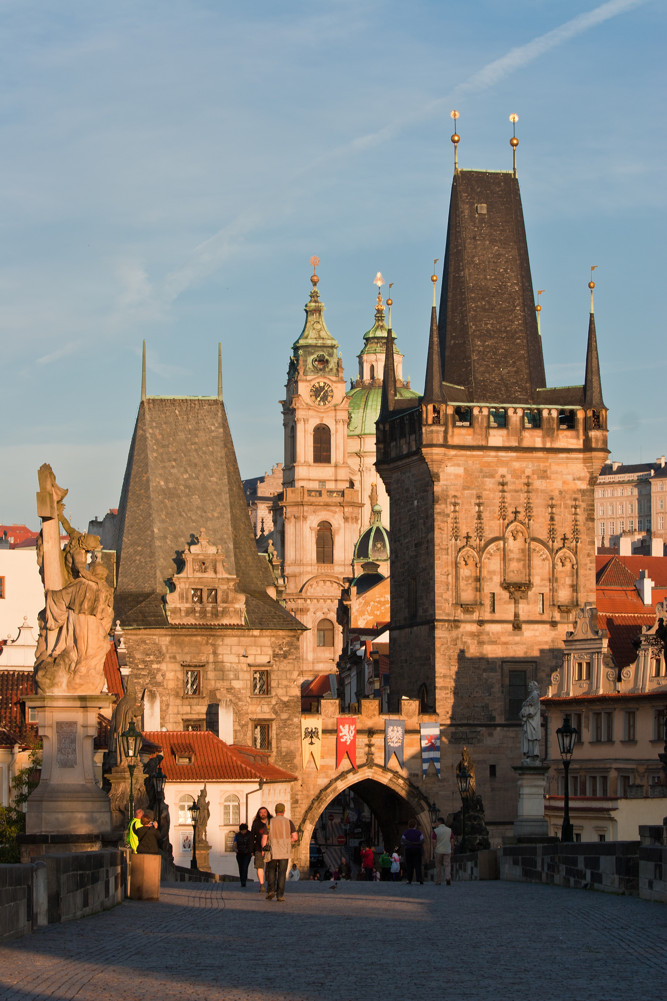 Ranní pohled na Karlův most